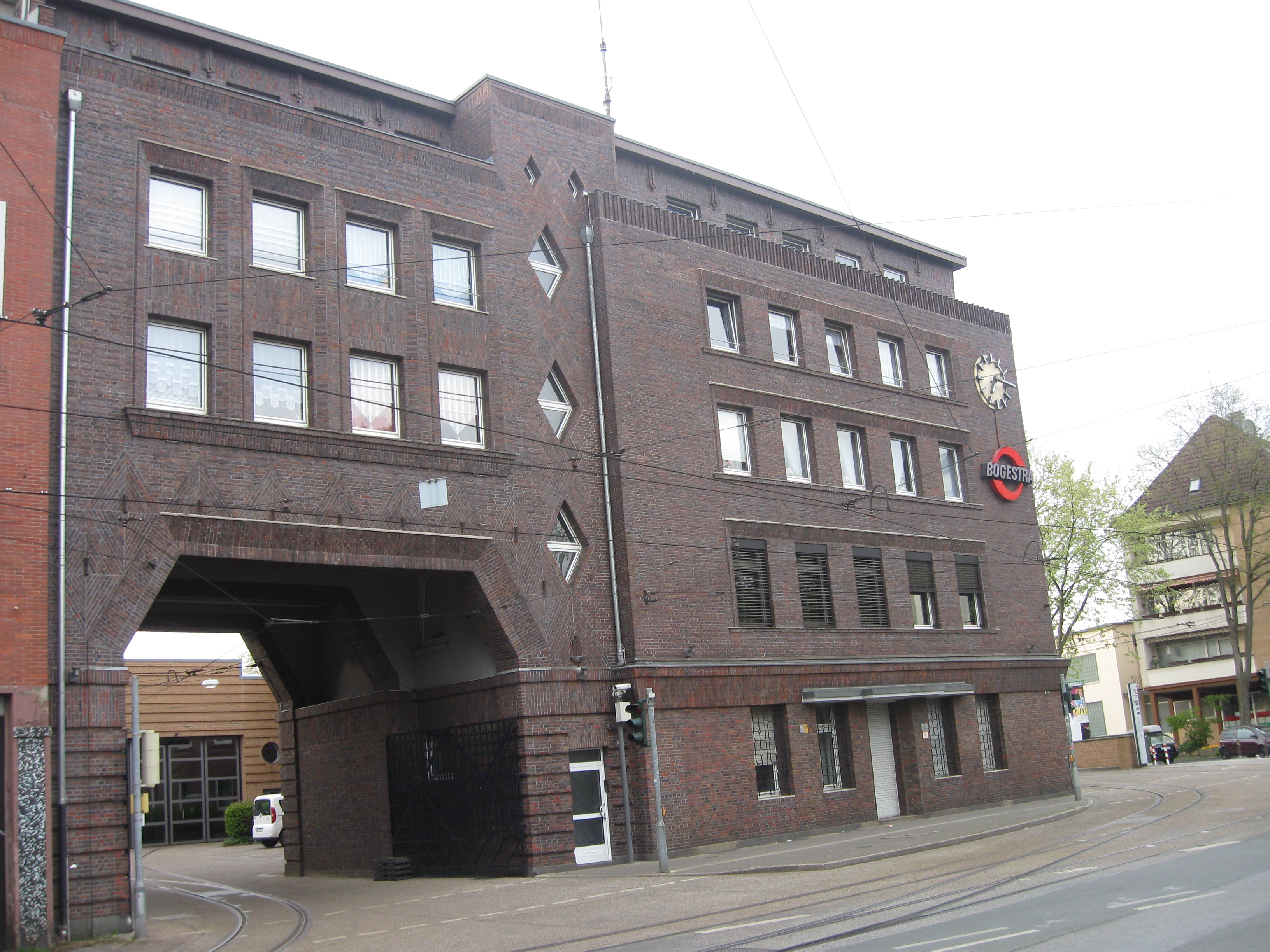 Straßenbahndepot und Verwaltungsgebäude der Bochum-Gelsenkirchener-Straßenbahnen (BOGESTRA) in Gelsenkirchen. Der Betriebshof an der Hochstraße (heute: Hauptstraße 55, gegenüber dem Grillo-Gymnasium) entstand bereits 1895 bei Gründung der Bogestra. Der Torbau im Stil des Backsteinexpressionismus wurde 1925–1926 nach einem Entwurf von Josef Franke errichtet.